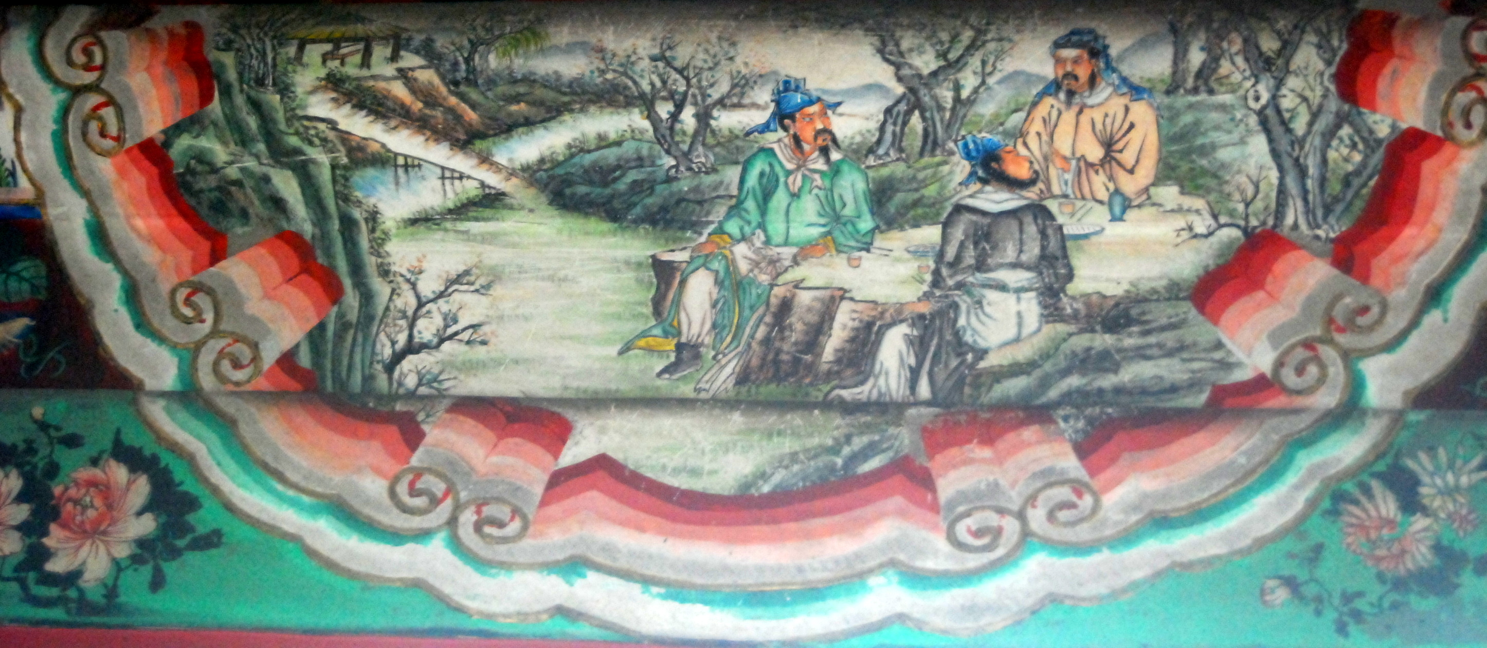 颐和园长廊上的彩绘：刘关张桃园三结义